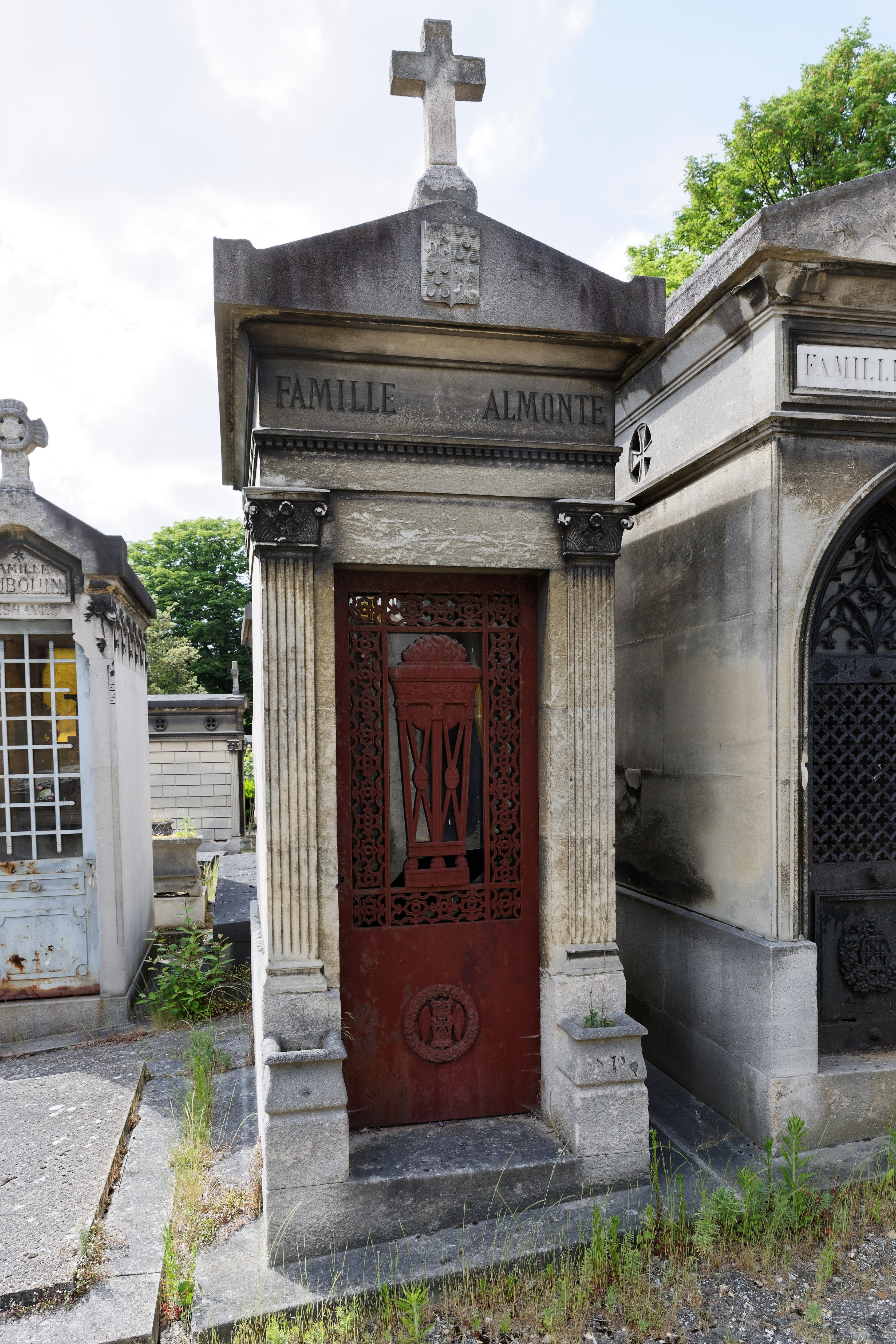 Sépulture de Juan Nepomuceno Almonte (1803-1869), général et diplomate mexicain.